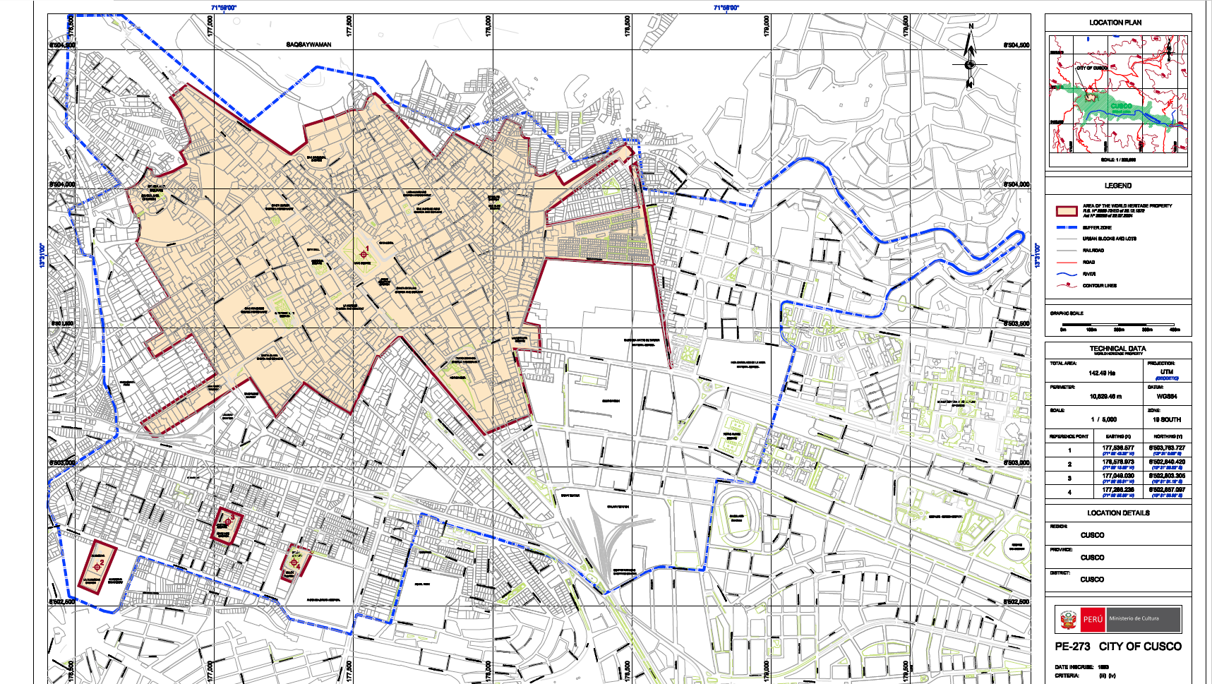 Map of the city of Cusco by UNESCO showing the area declarated as World Heritage and its buffer zone.